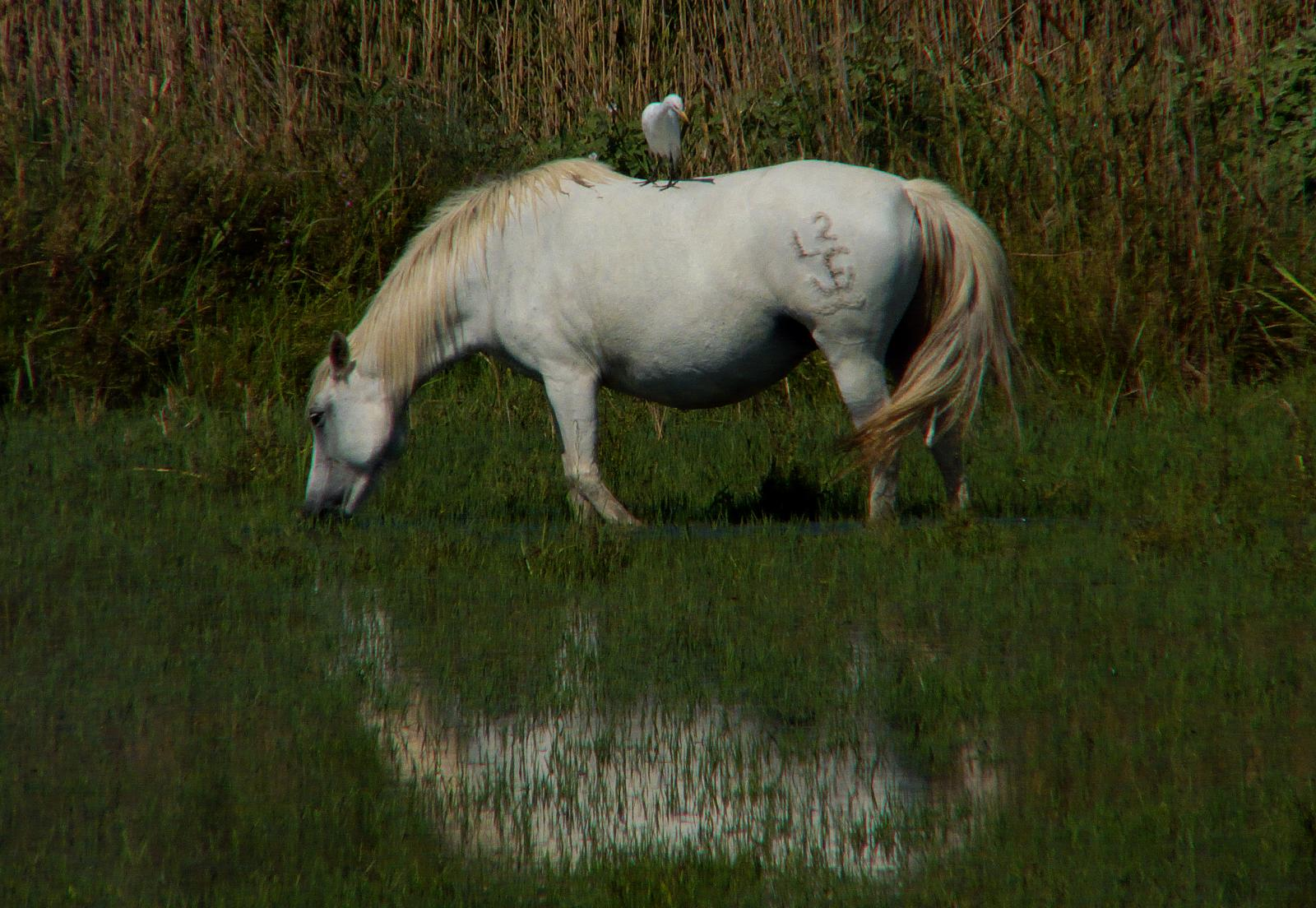 Cheval Camarqueais et oiseau. Balade en Camargue